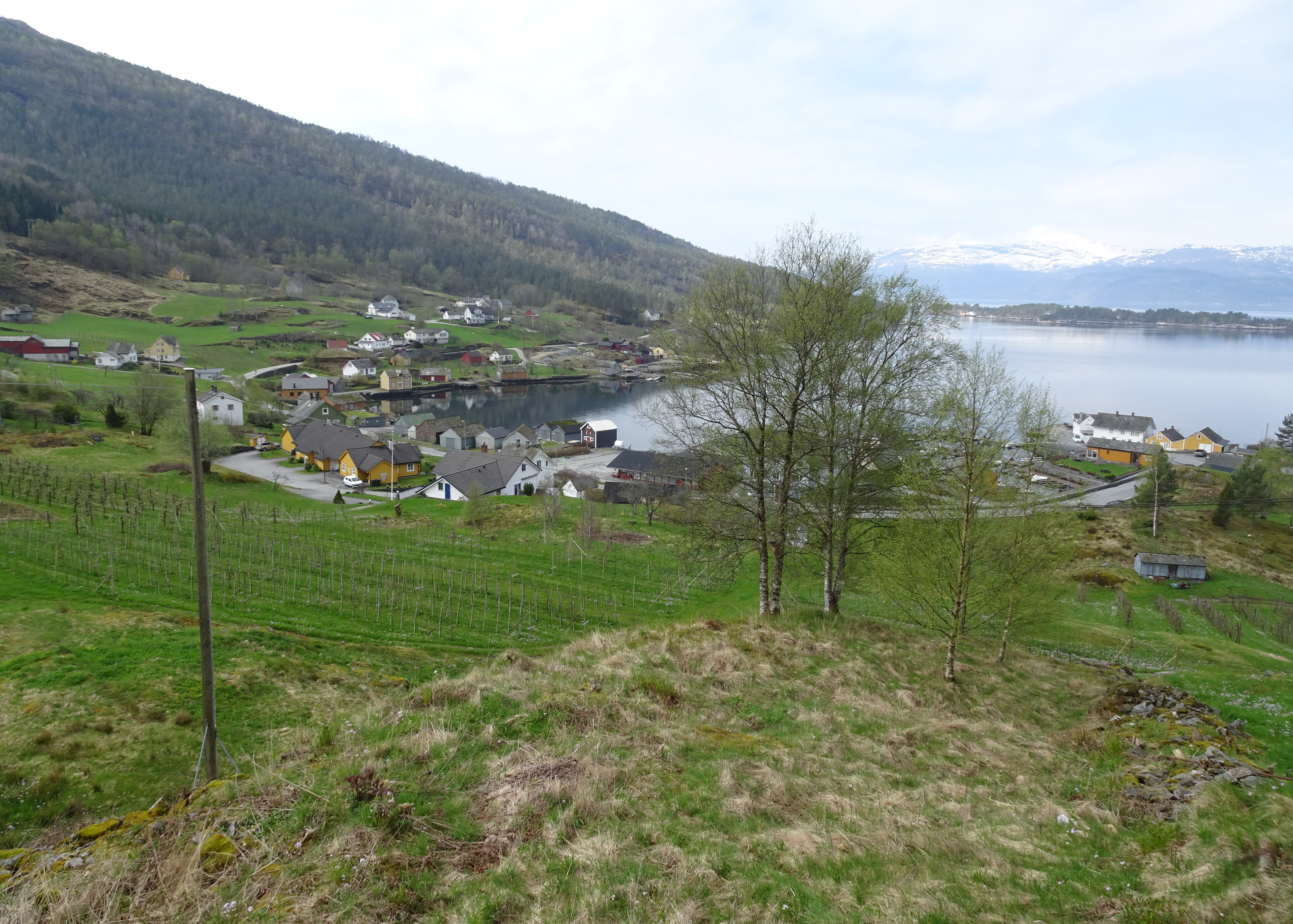 Herand i Jondal